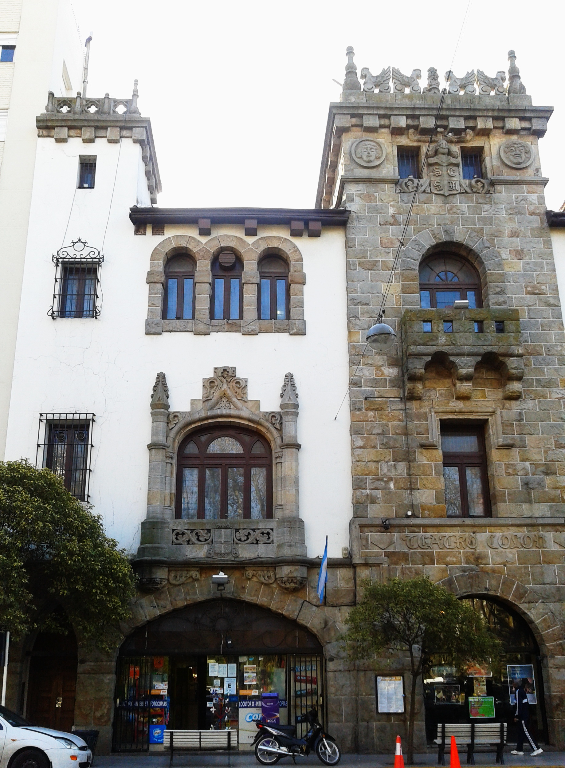 Fachada del Teatro Colón vista desde la calle Hipólito Yrigoyen. Ciudad de Mar del Plata, Provincia de Buenos Aires, Argentina.